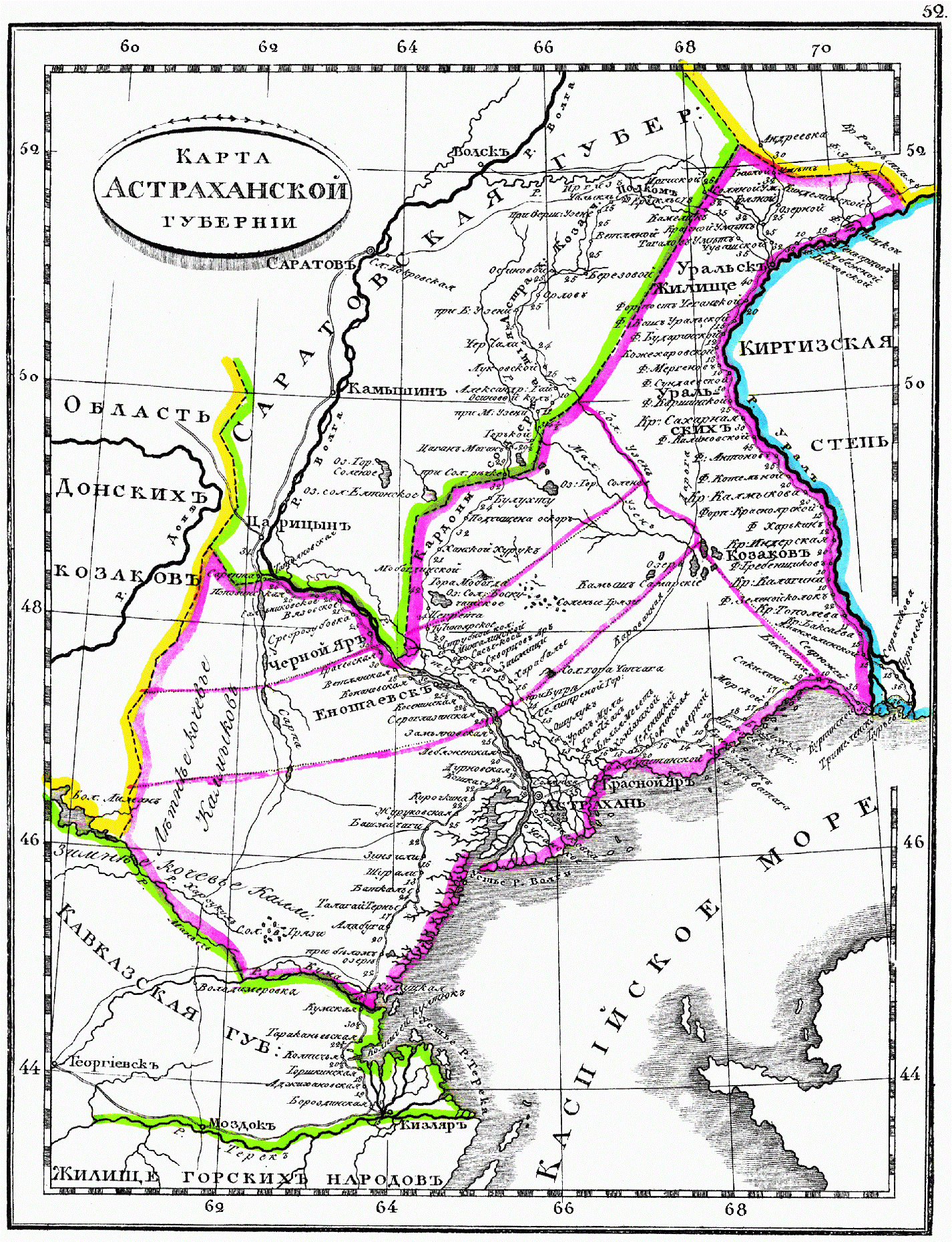 Карта Астраханской губернии, 1835